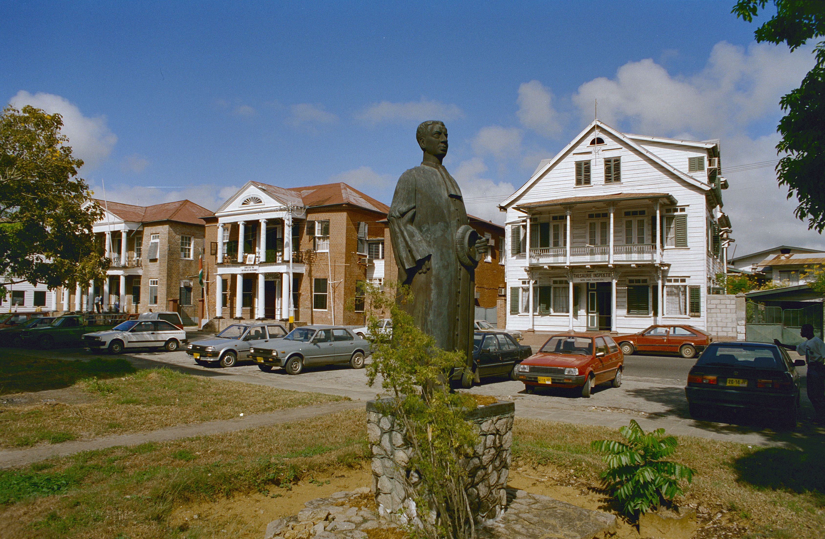 Koloniale geschiedenis/ Standbeeld: Overzicht van de voorgevels met standbeeld van Mr. Dr. J.C. de Miranda (opmerking: Suriname Reis Loek Tangel)